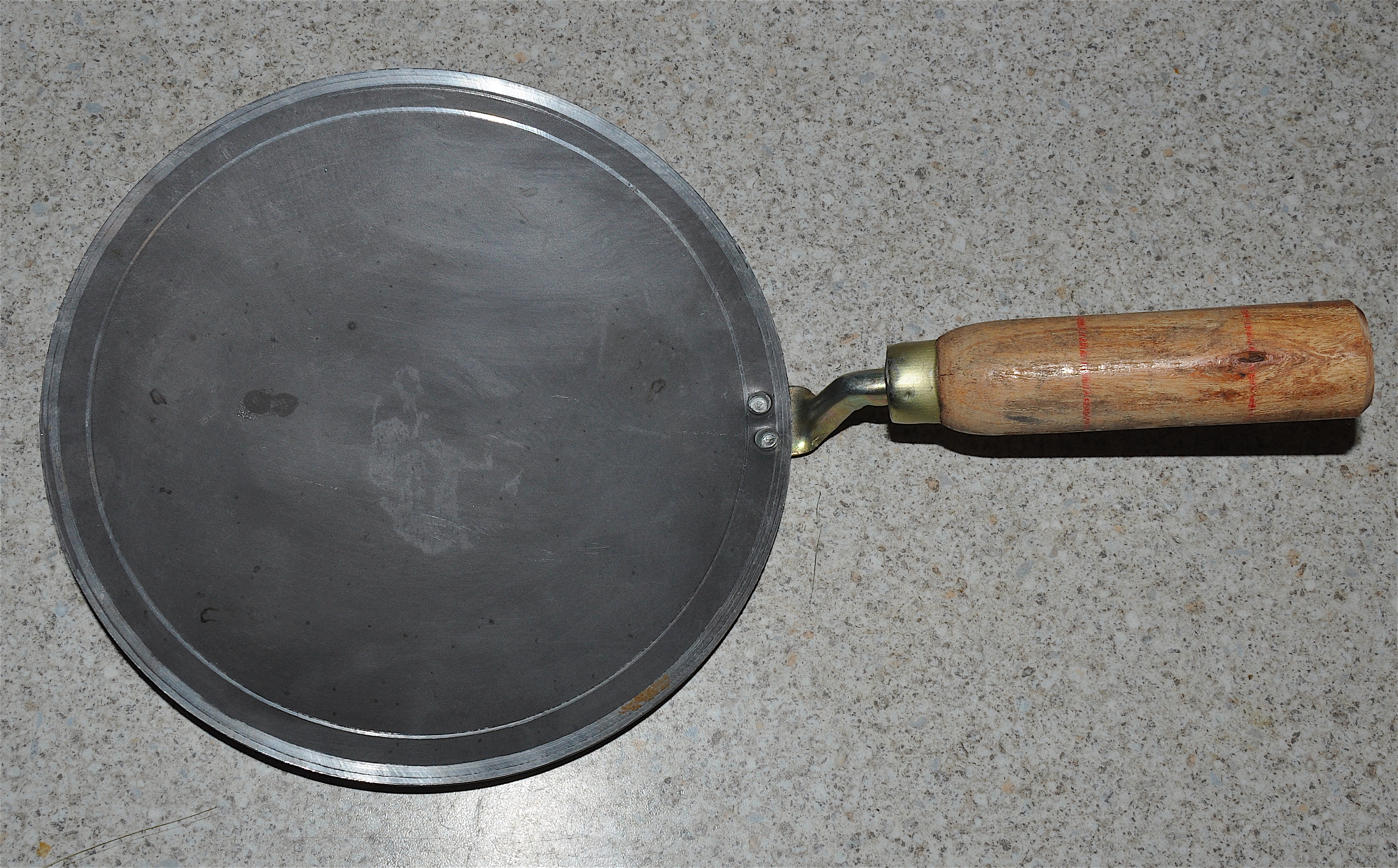 Tava Ø 22 cm, Indien, Pfanne für Fladenbrot